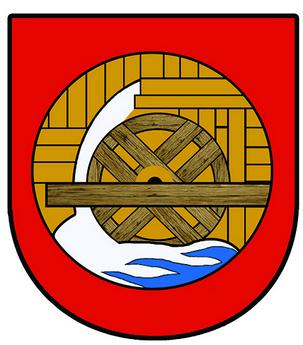 Herb gminy Kobyla Góra.